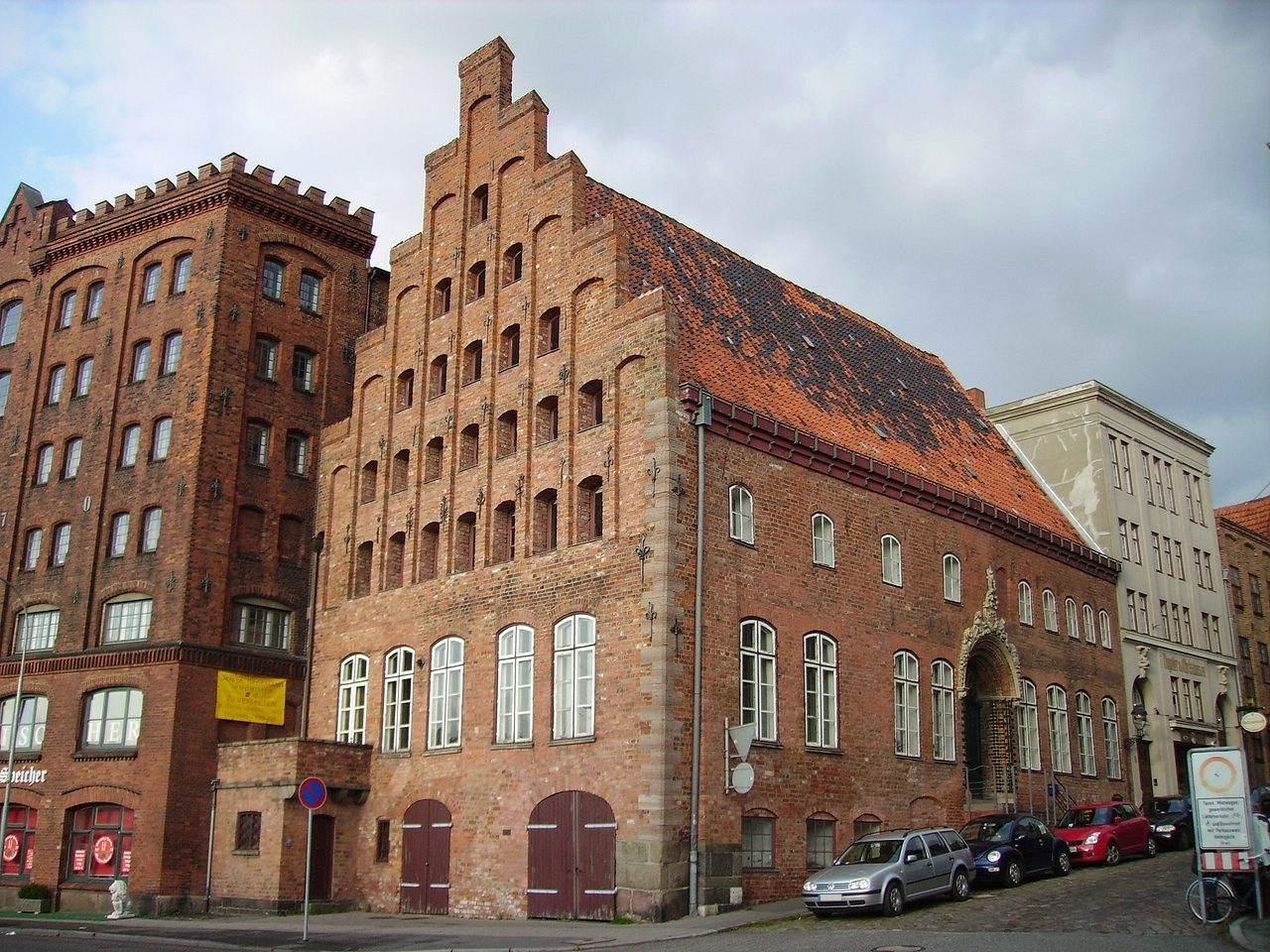 Speichergebäude an der Untertrave in Lübeck